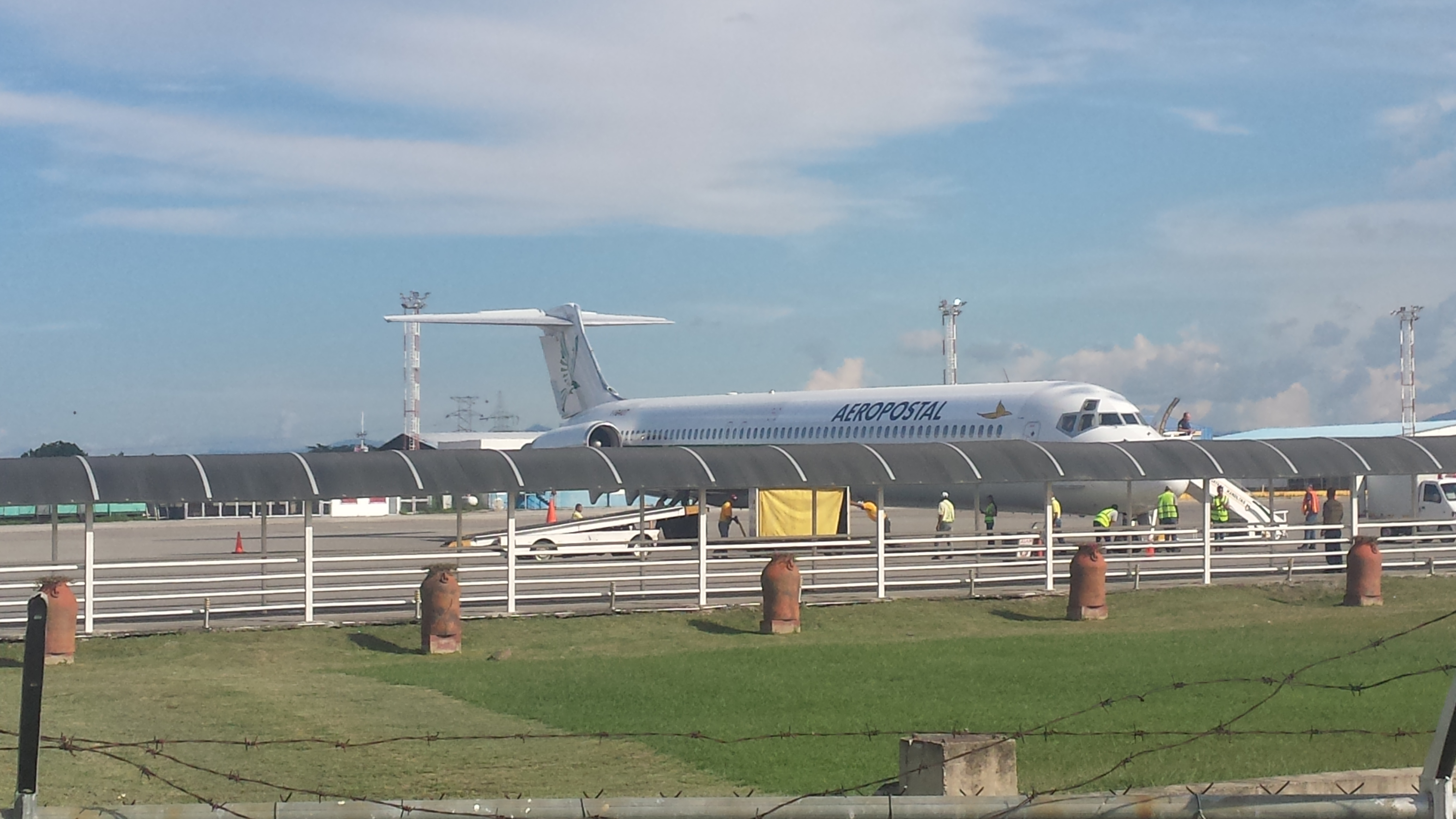 Mcdonell Douglas 82 aparcado en el Terminal Nacional 13/11/18